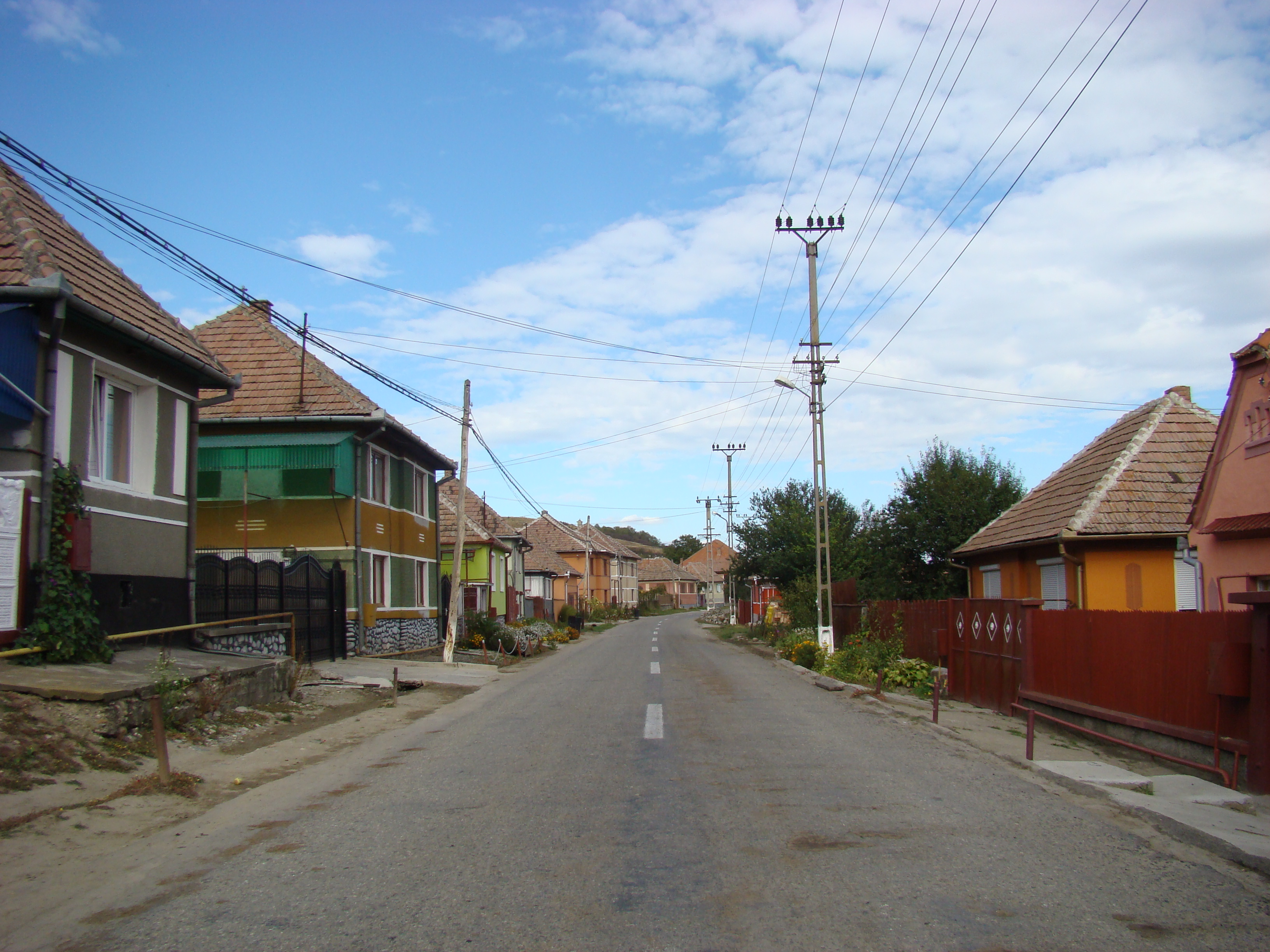 Loamneș, Sibiu